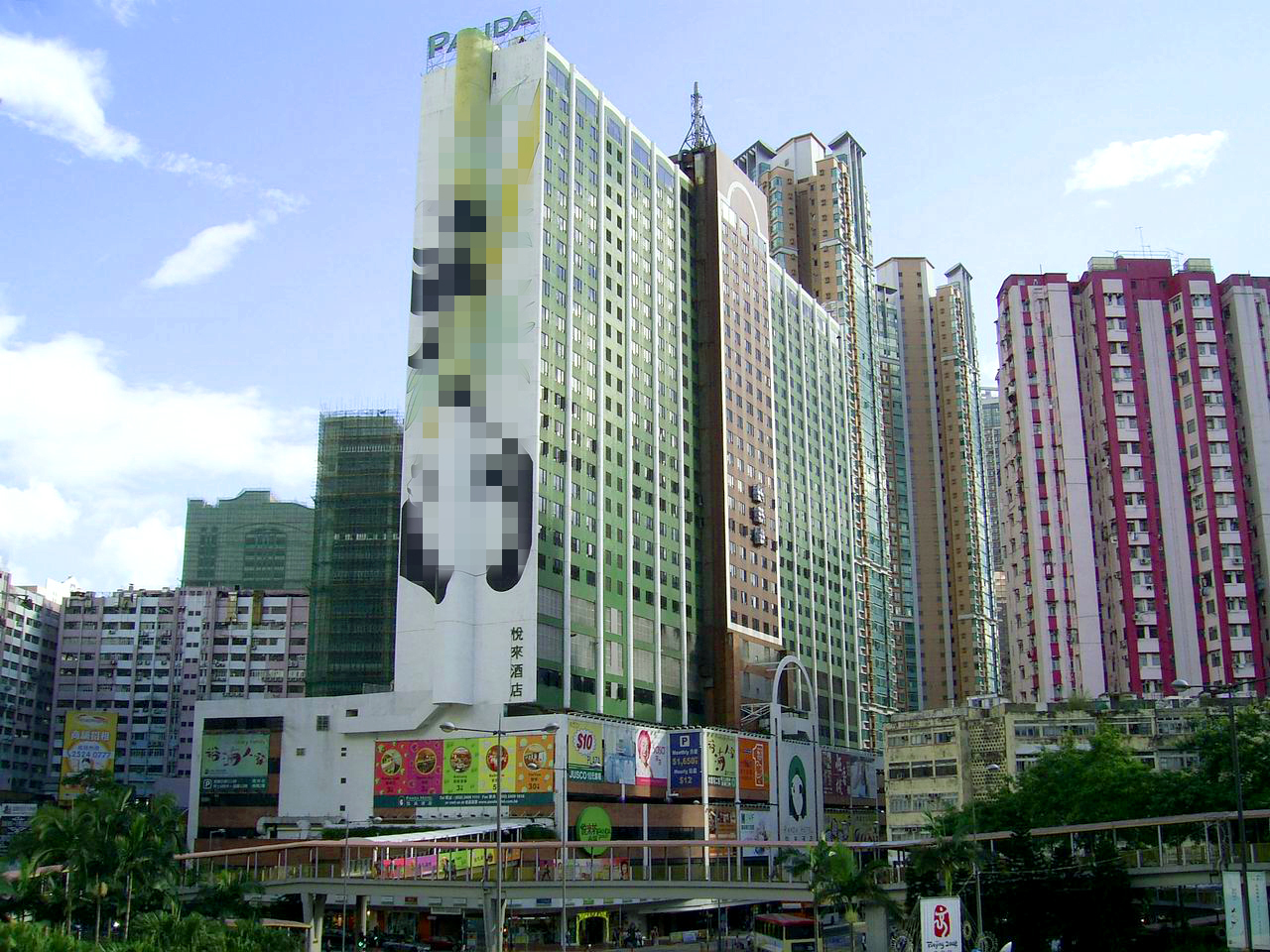 中文（香港）: 荃灣悅來酒店